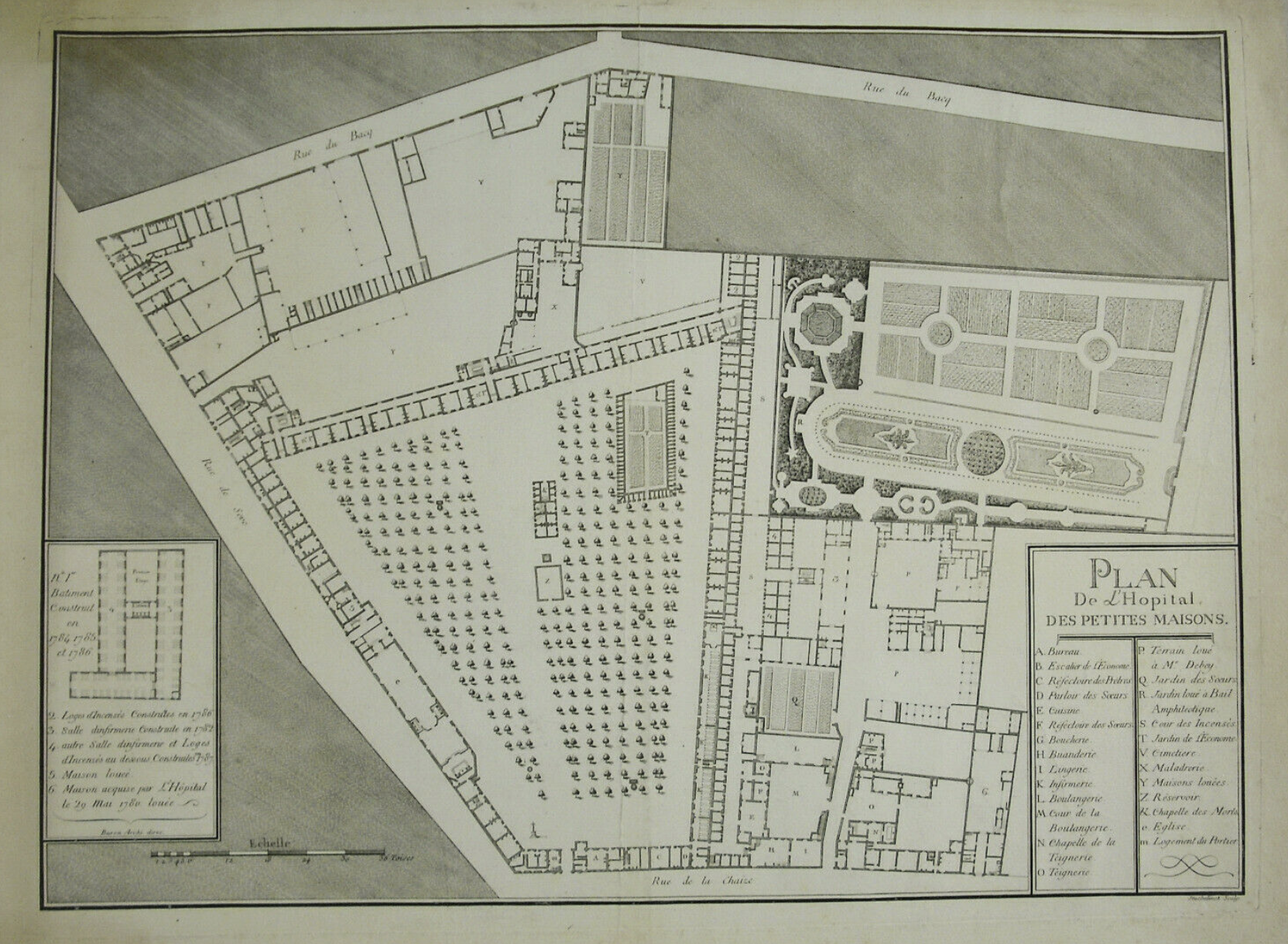 Gravure d'un plan de l'Hôpital psychatrique d'aliénés des Petites Maisons square Boucicaut